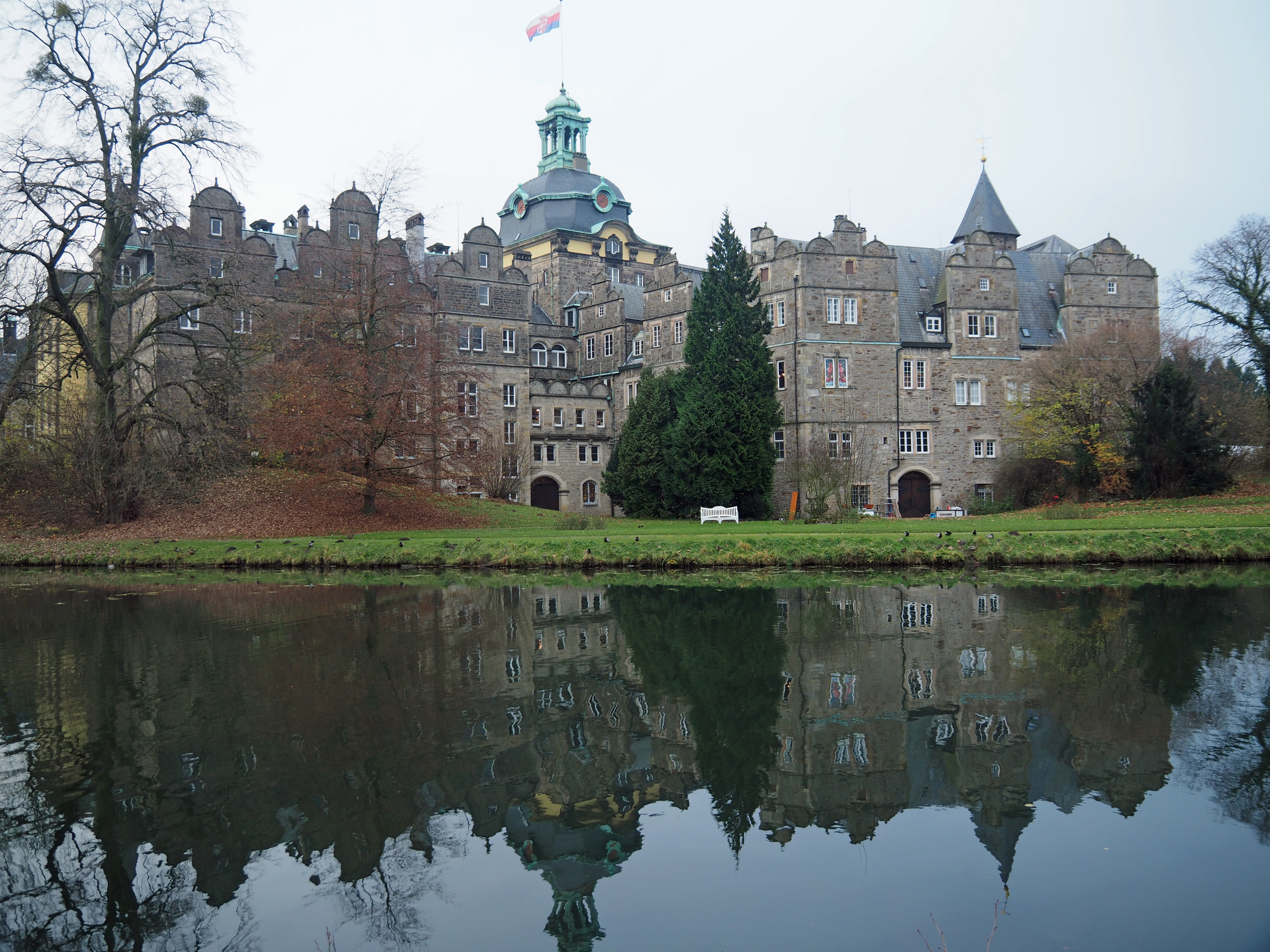 Rückansicht (West-Seite) Schloss Bückeburg